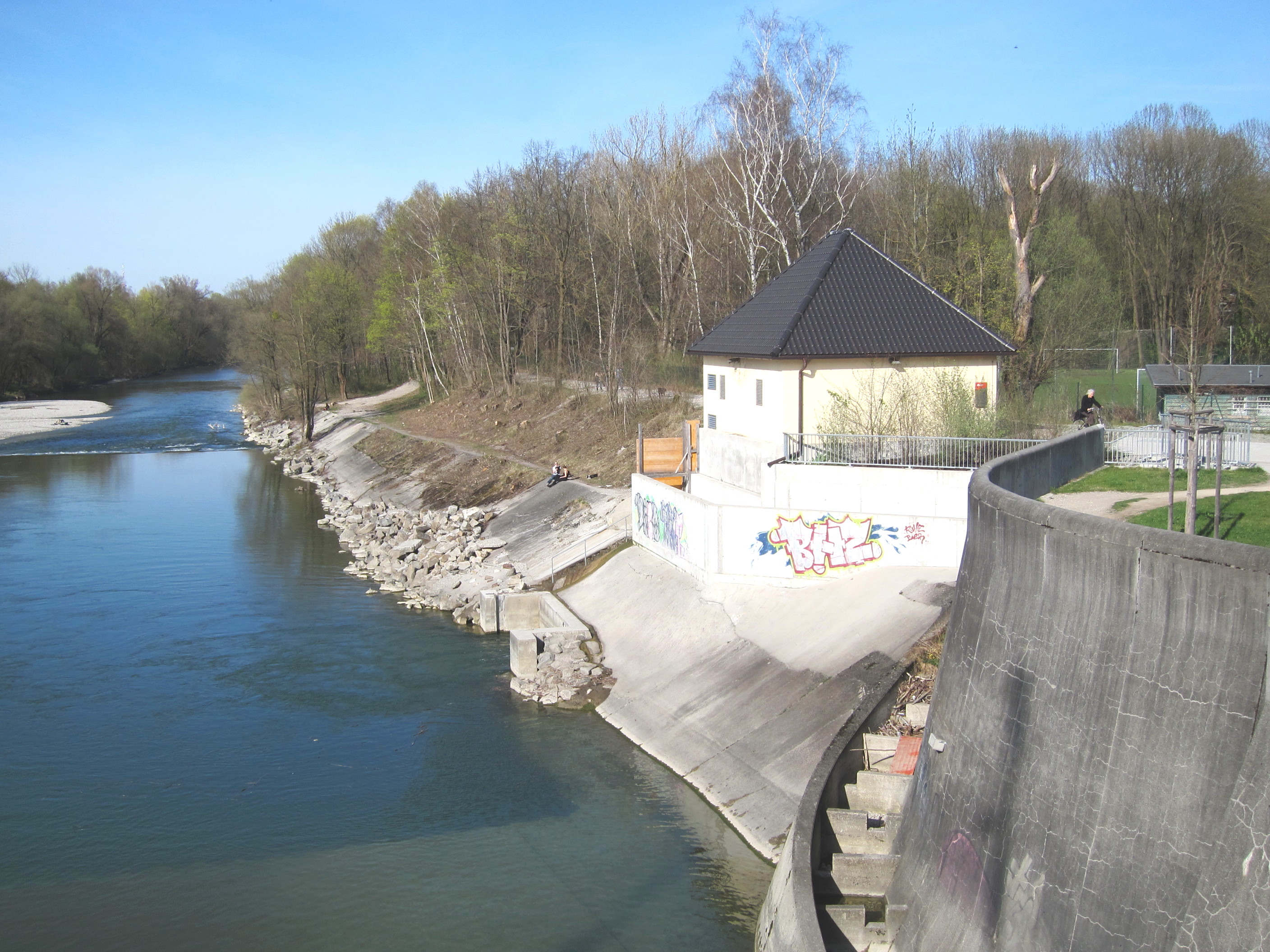 Isar unterhalb des Stauwehrs, Betriebsgebäude des neuen, unterirdischen Kraftwerks mit alter und neuer, nicht fertiggestellter Fischtreppe (die an der Bretterwand endet) sowie Kraftwerksauslass unterhalb des Betriebsgebäudes